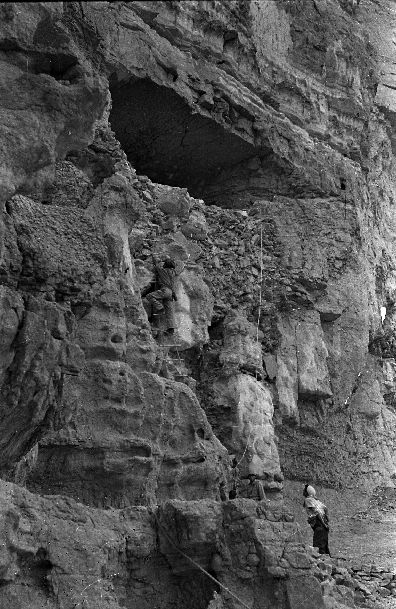 מערת האיגרות הוא שמה של מערה בנחל חבר שבמדבר יהודה, שבה התגלו ממצאים חשובים מימי מרד בר כוכבא ובהם איגרות שכתב בר כוכבא לאנשי עין גדי. אחד מפתחי המערה